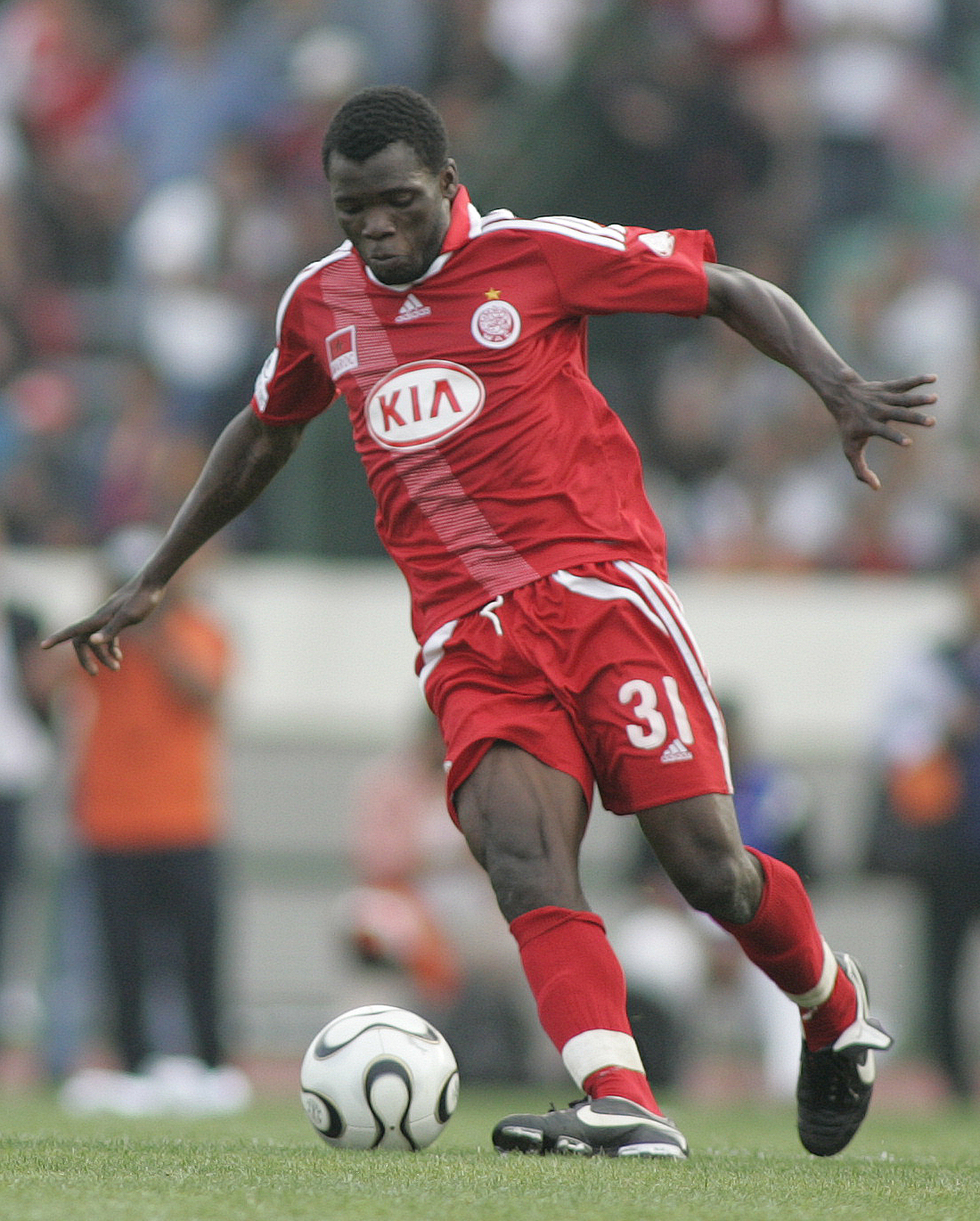 باسكال أحد اللاعبين الأفارقة الذين حملوا قميص النادي.